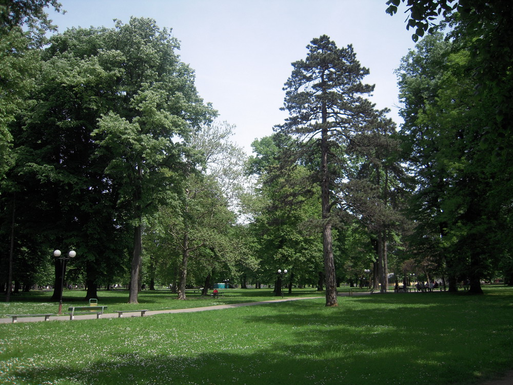 Park Mladen Stojanović